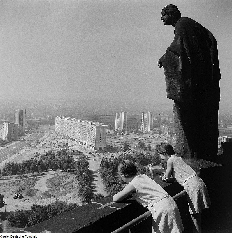 Original image description from the Deutsche FotothekDresden. Aussichtsplattform des Rathausturmes mit Besuchern, Blick nach Süden, Hotels und Rundkino gibt es noch nicht